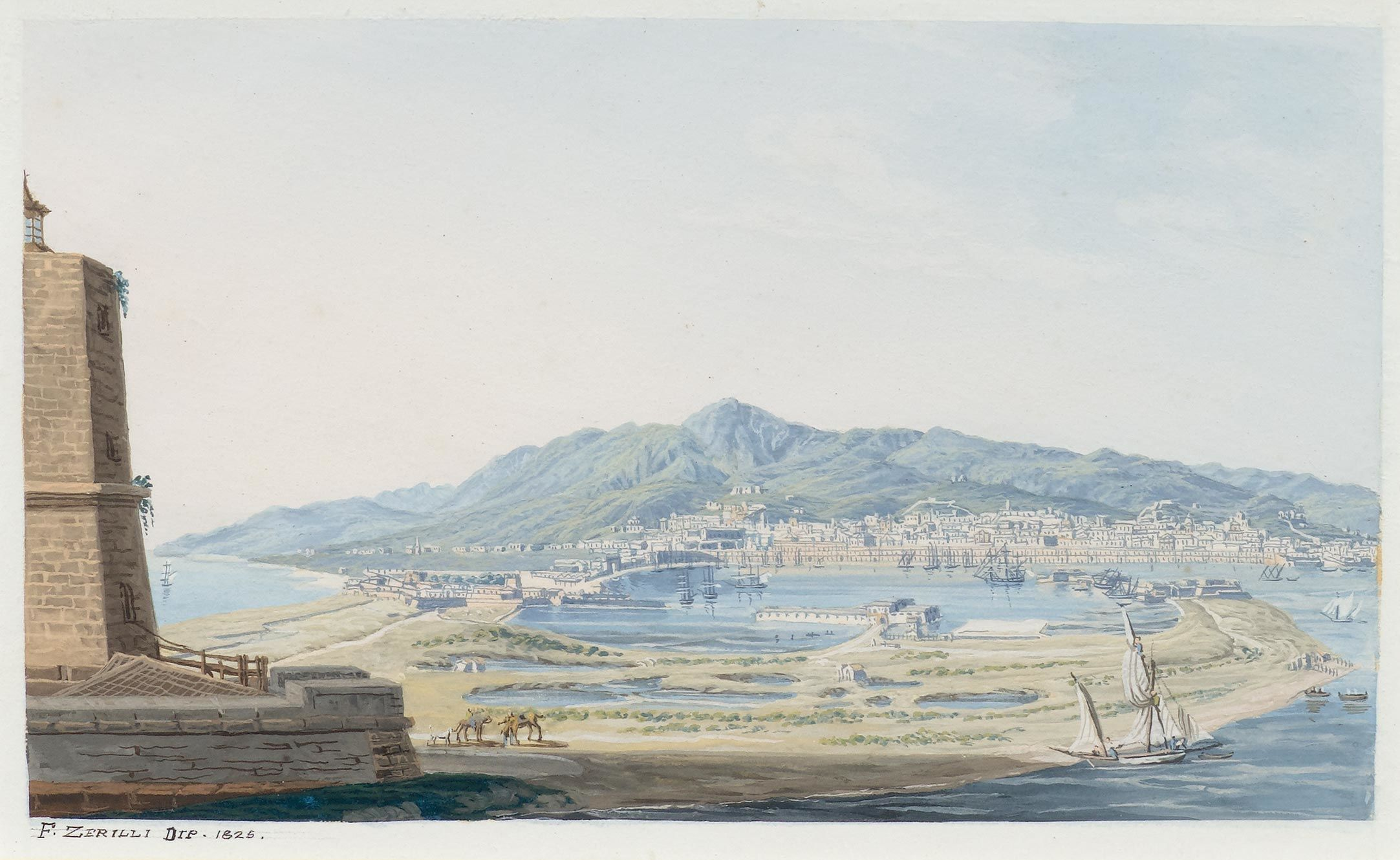 Blick auf den Hafen und die Stadt Messina. Unten links mit schwarzer Feder signiet und datiert: F. Zerilli dip. 1825. Gouache, weiss gehöht. 10 x 16 cm